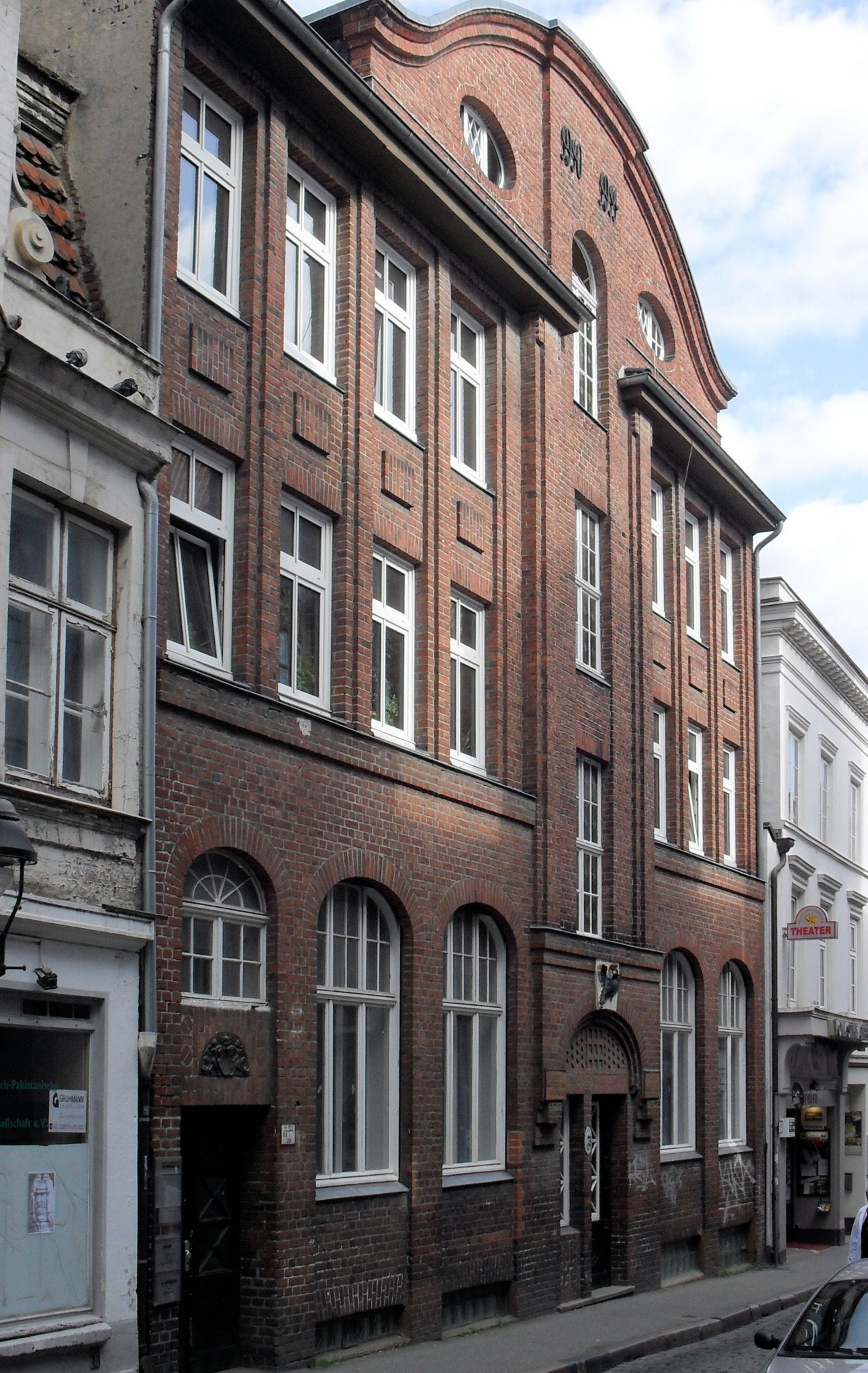 Hermbergsches Haus, Dr.-Julius-Leber-Straße 23 in Lübeck